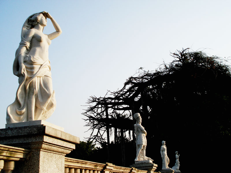 2006-广州世界大观